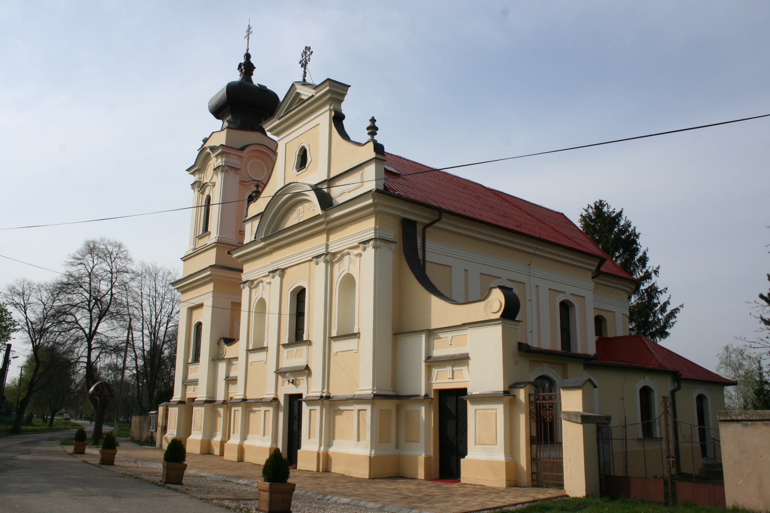 Vajkmártonfalva